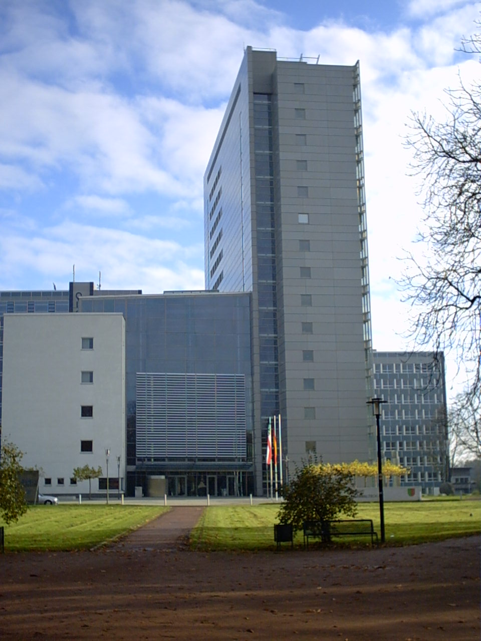 Oberlandesgericht in Hamm, Gerichtsgebäude an der Heßlerstraße, nach erfolgter Renovierung